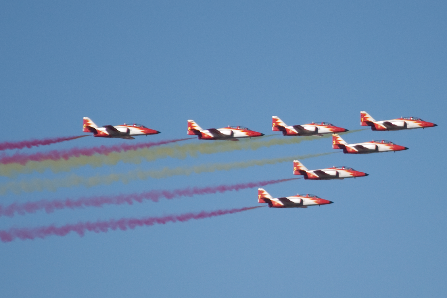 Patrulla Aguila - Madrid 12 de octubre de 2009 - Día de la Hispanidad Desfile aéreo